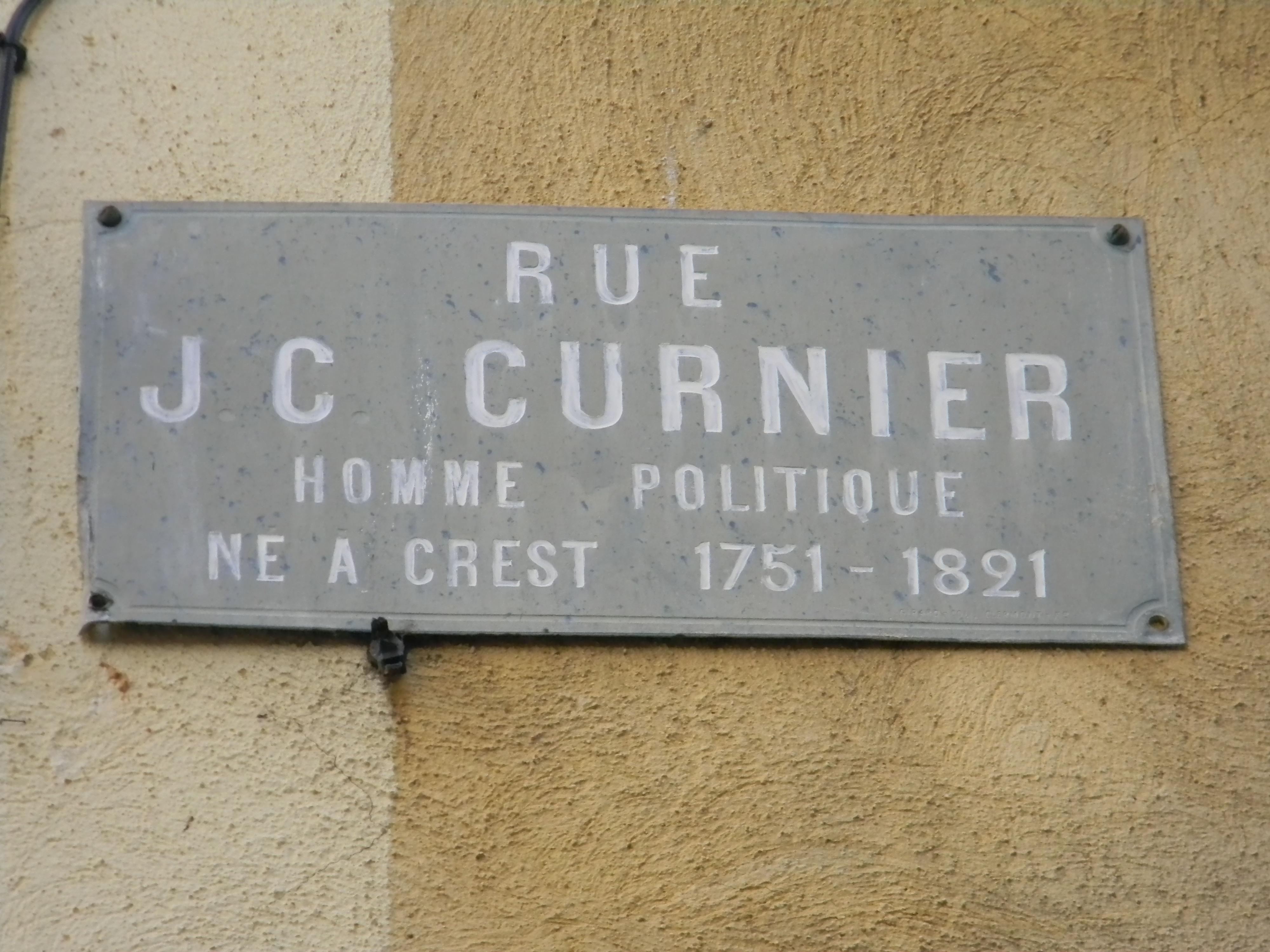 Rue JC Curnier, homme politique né à Crest, 1751 - 1821.